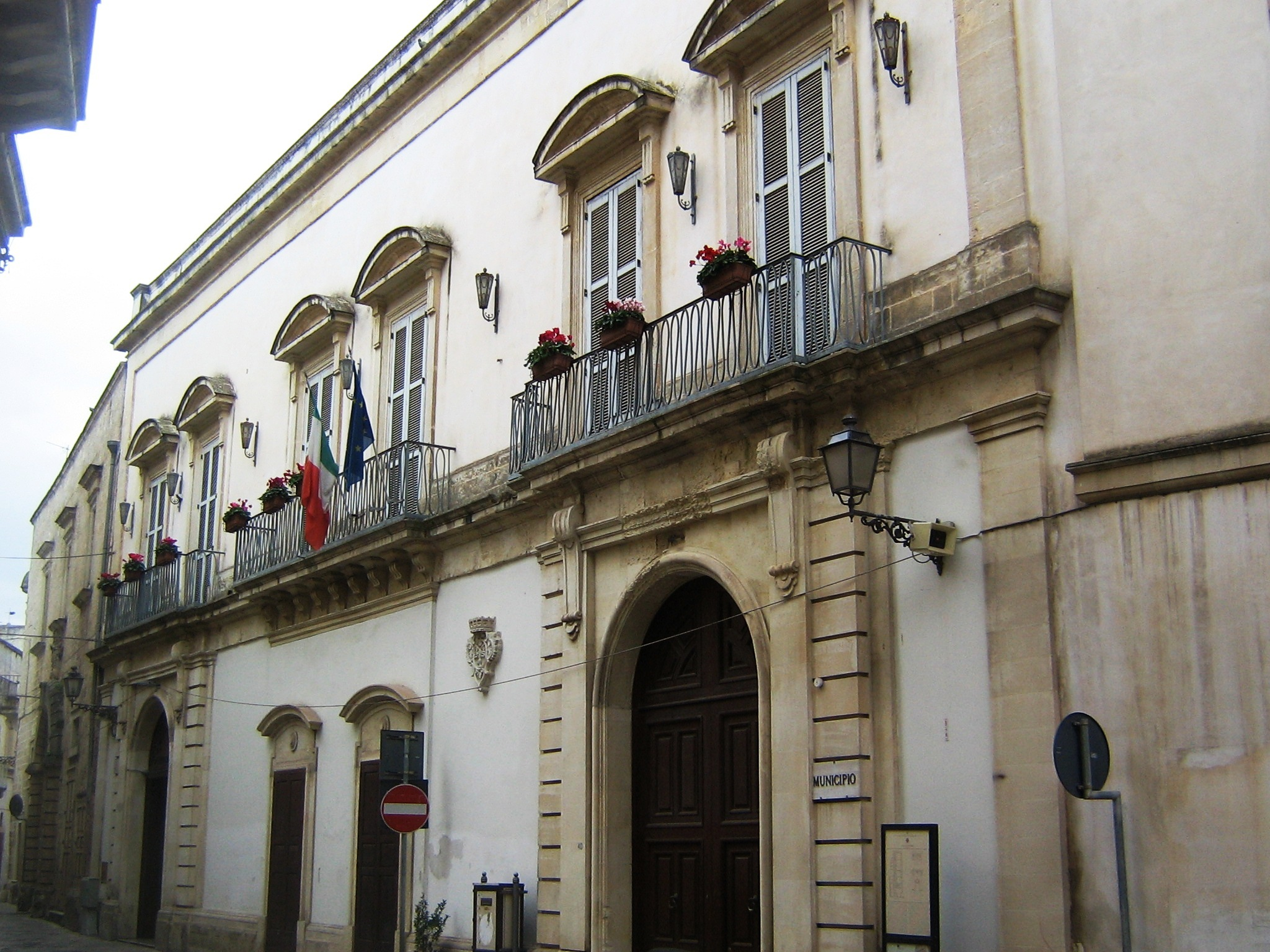 Palazzo Orsini Galatina